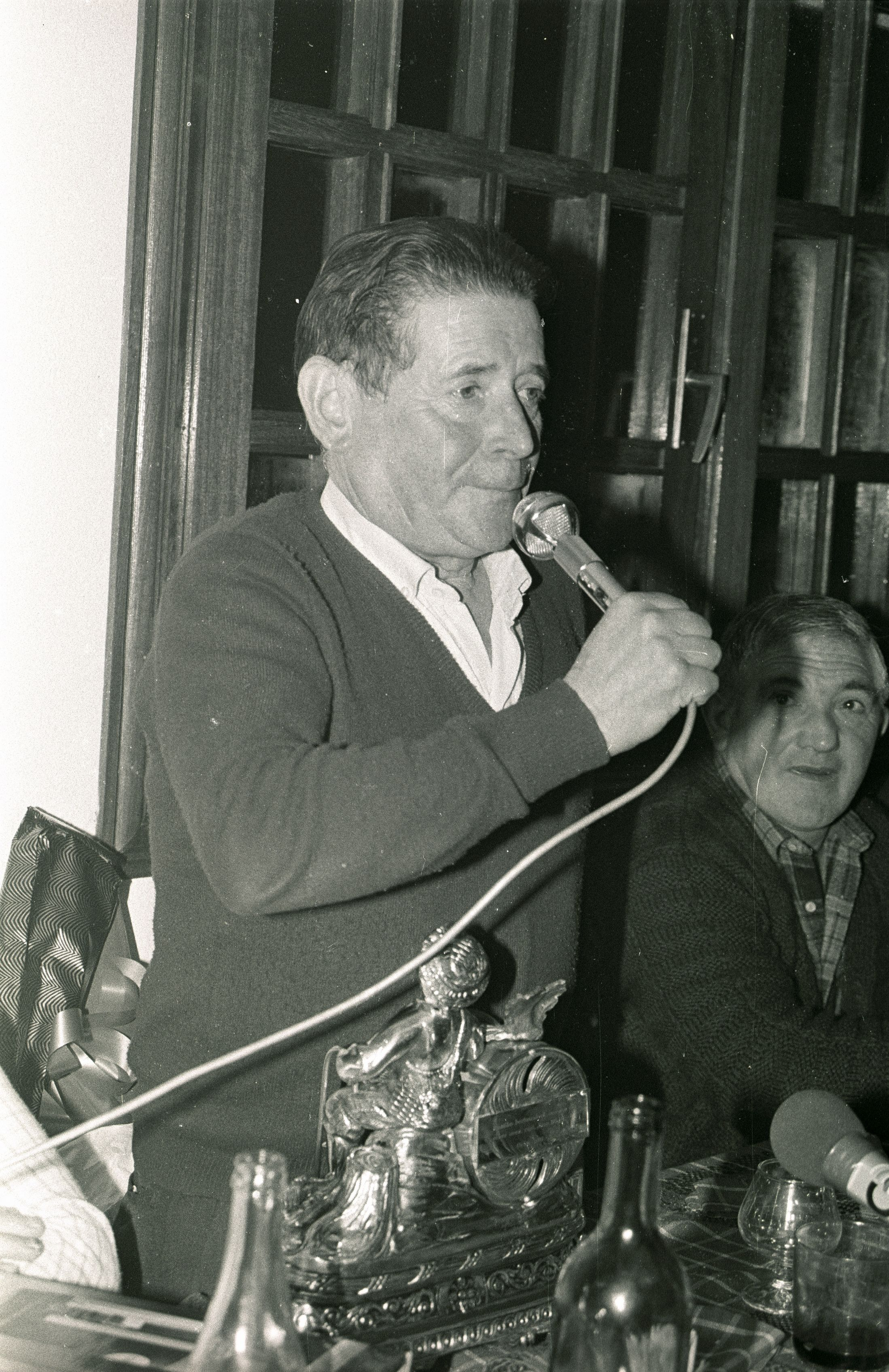 Omenaldia Lazkao Txiki bertsolariari